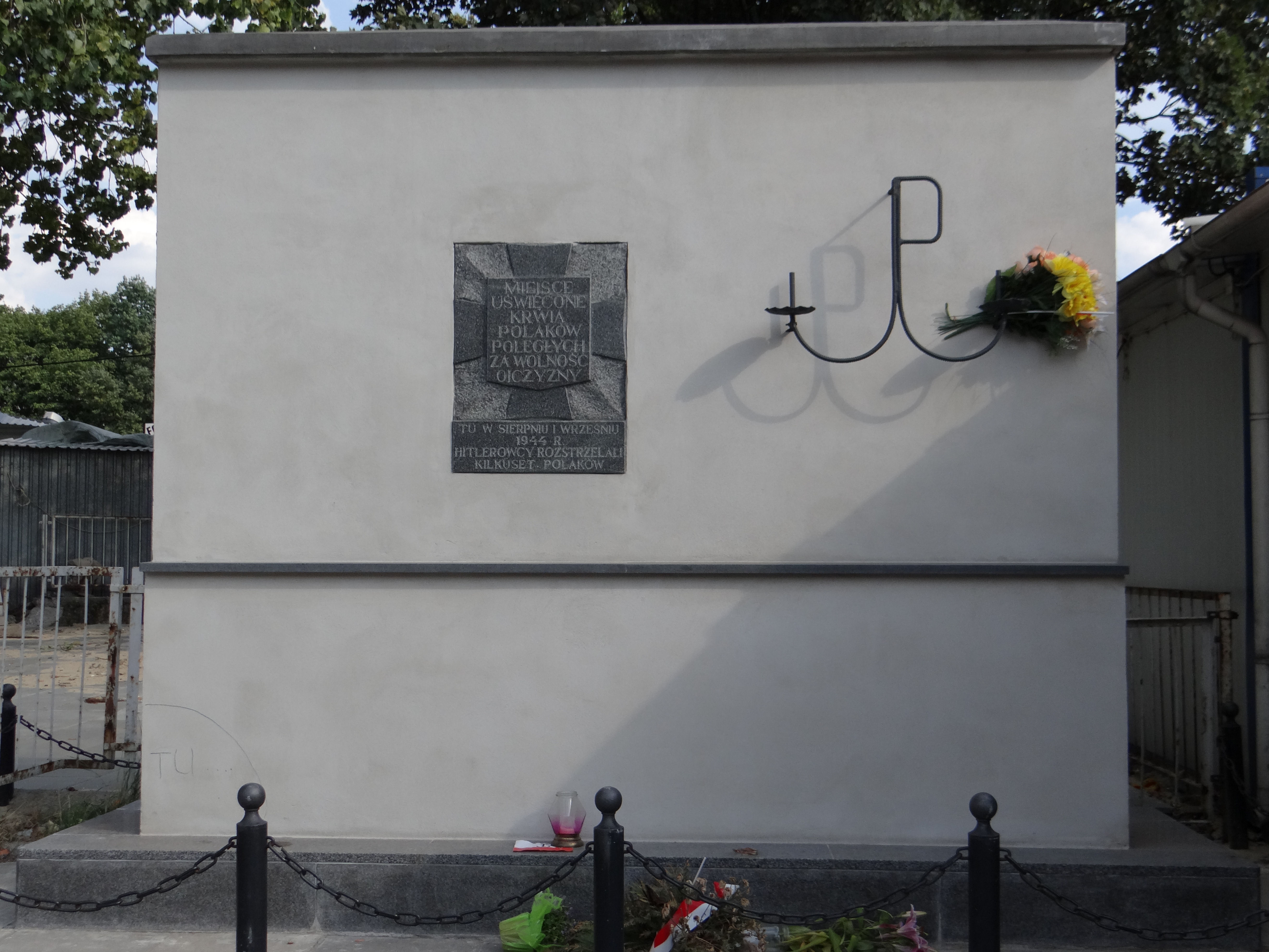 Miejsce kaźni kilkuset Polaków w sierpniu i we wrześniu 1944r